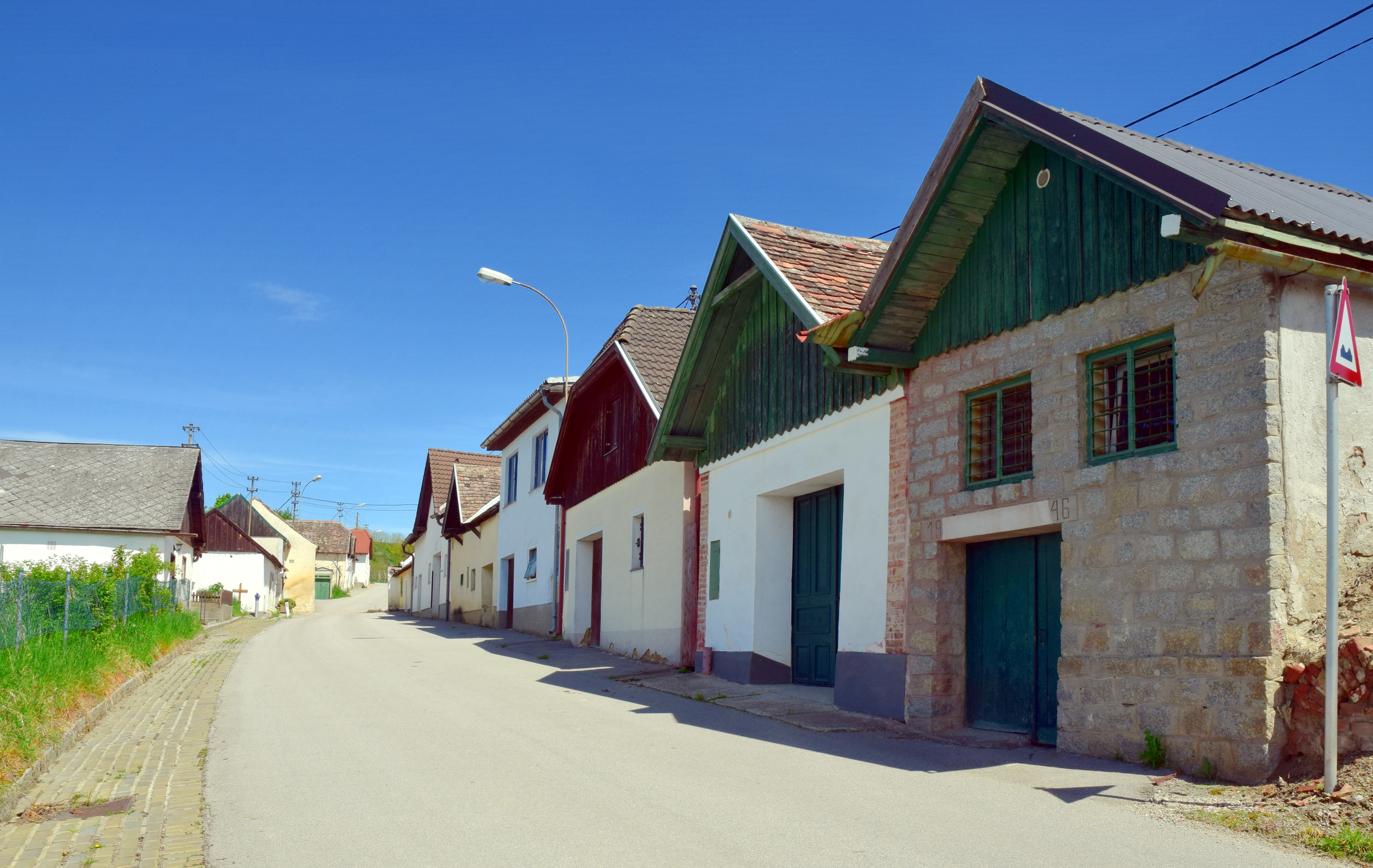 Kellergasse Auggenthaler Kellertrift in der KG Auggenthal in Haugsdorf